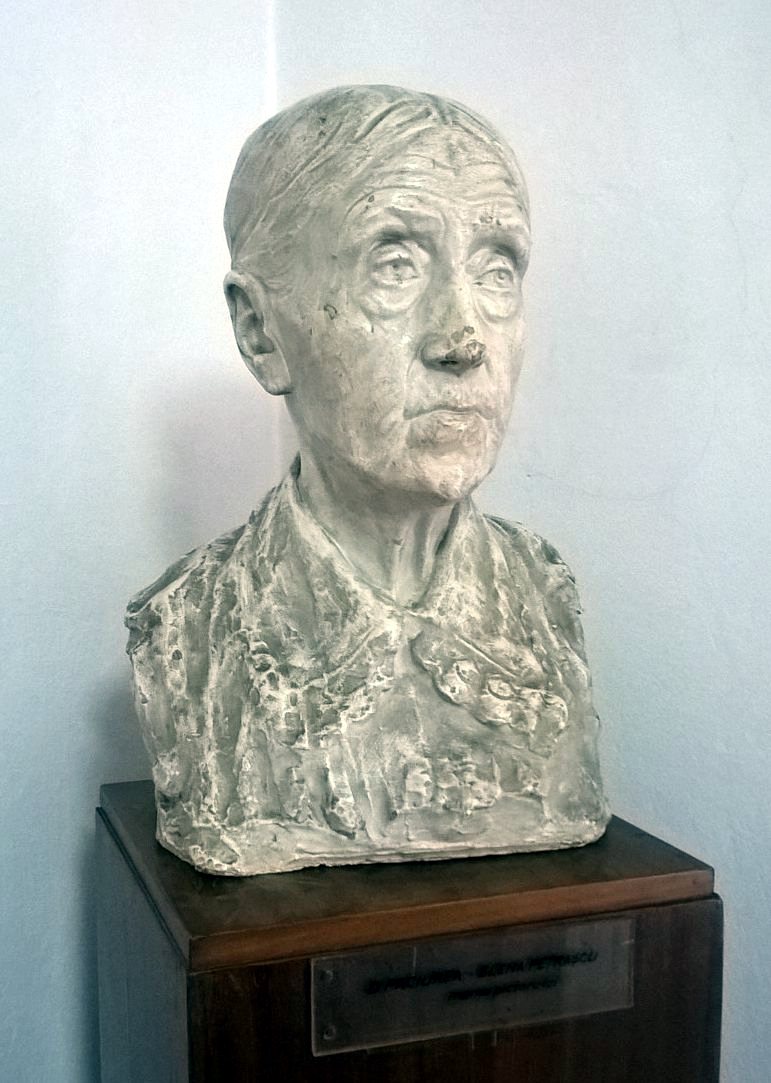 Mama lui Gheorghe Petrașcu - Elena (Ilenuța) Bițu–Dumitriu, operă a lui Dimitrie Paciurea